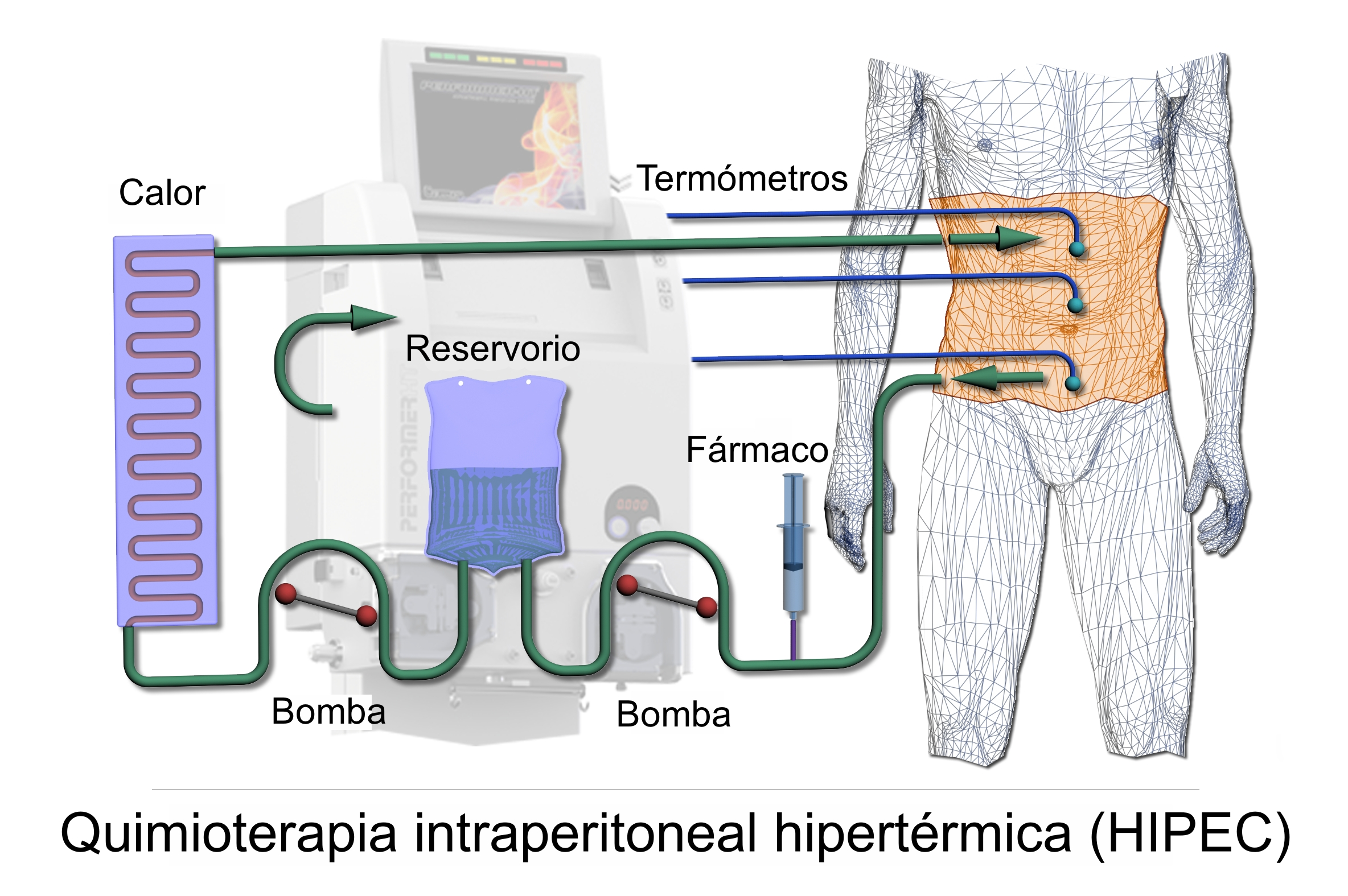 Esquema en el que se describe la técnica de quimioterapia intraperitoneal hipertérmica que se utiliza para el tratamiento del cáncer que afecta al peritoneo.